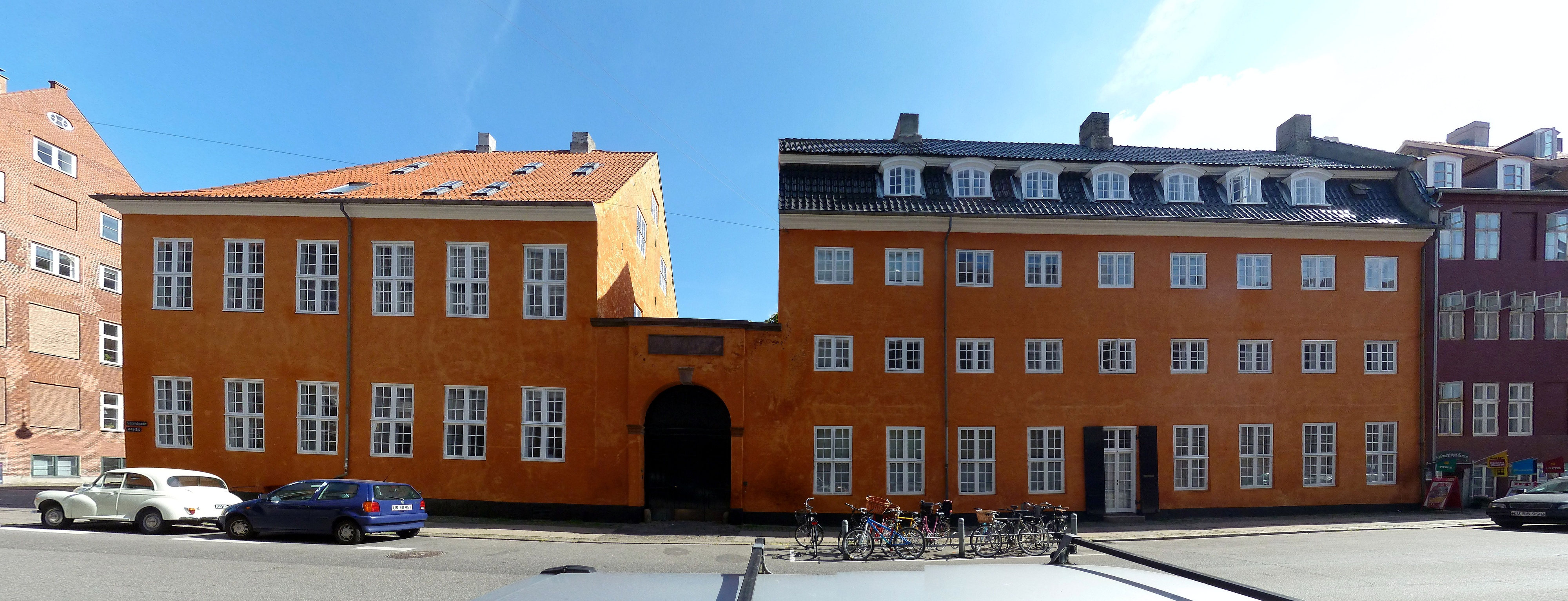 Irgens Gård on Strandgade in Christianshavn, Copenhagen, Denmark